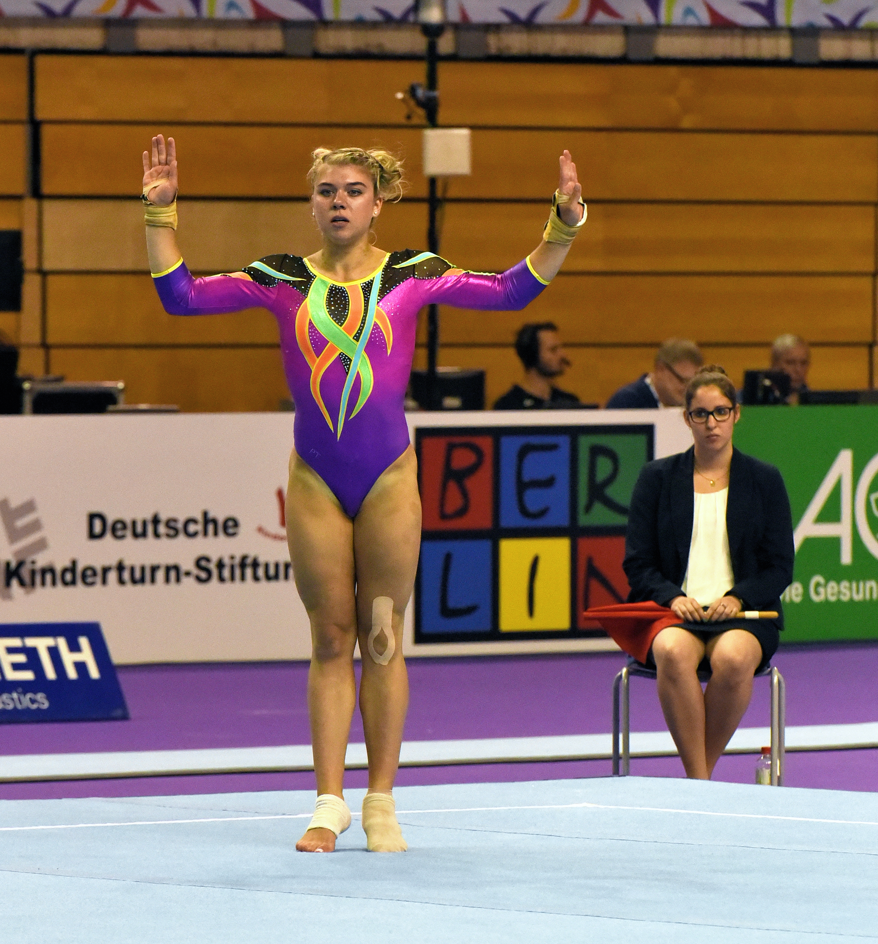 Deutsche Meisterschaften Gerätturnen Mehrkampf weiblich Wettkampf beim Internationalen Deutschen Turnfest Berlin 2017. Abgebildet ist Pauline Tratz.